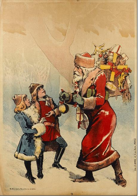 Lithographic poster : Le Père Noël et deux enfants, designed by an unknwon artist, printed in Paris by F. Appel.